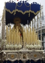 Estrella